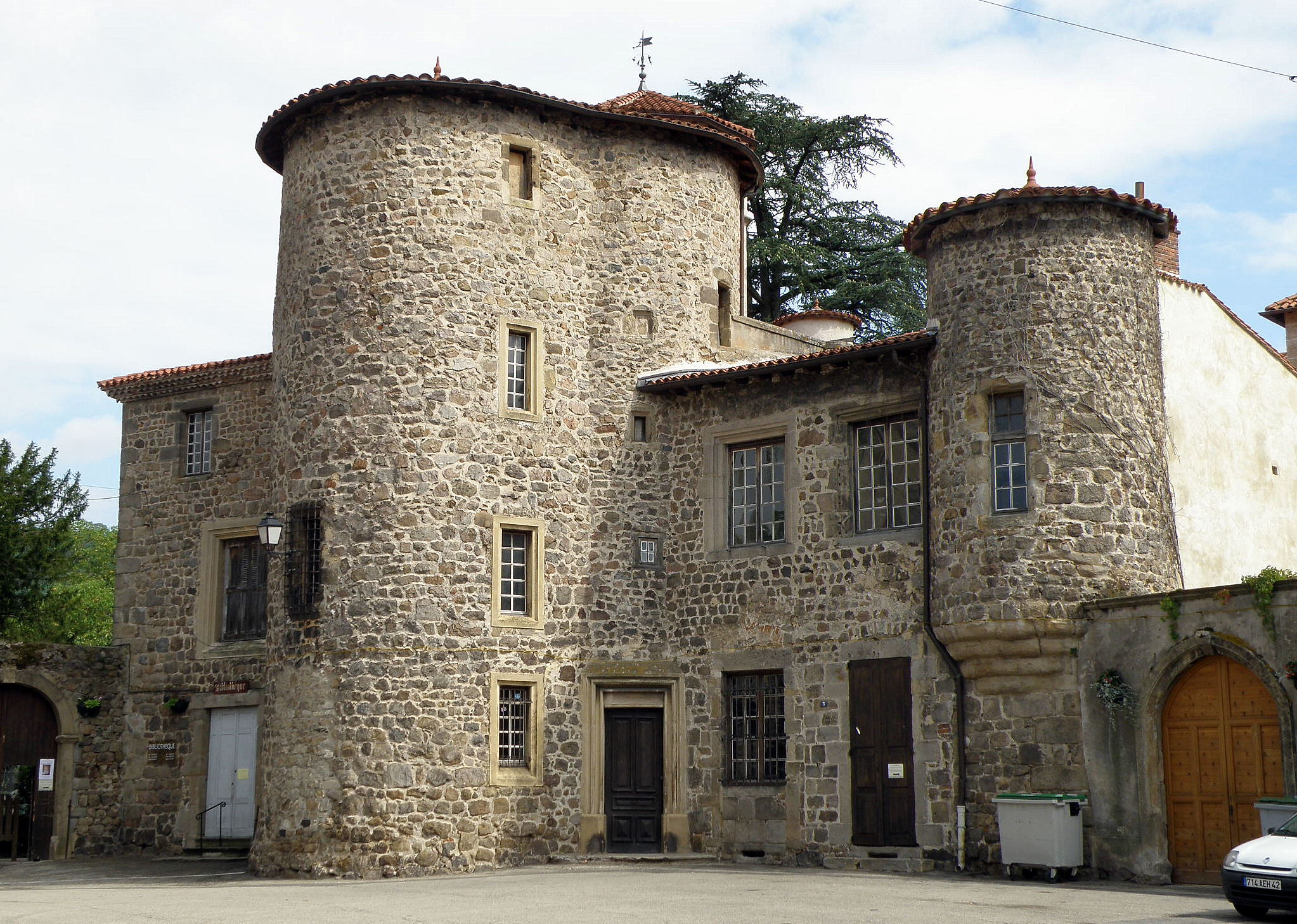 Aurec-sur-Loire, dép. de la Haute-Loire, France (région Auvergne). Château seigneurial d'Aurec, façade nord (côté rue).